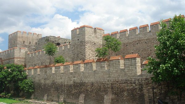 Foto dos muros de Constantinola (reconstrução